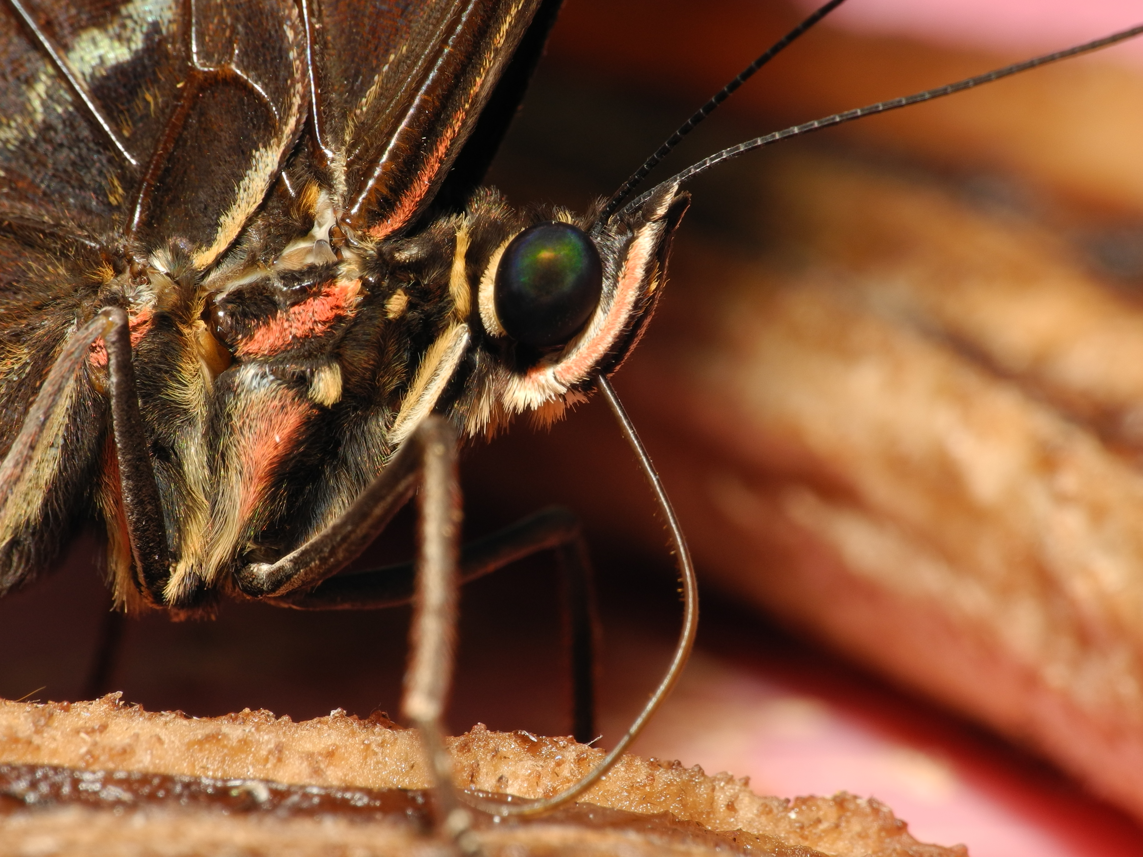 Morpho (Morpho sp.) vu au Jardin des papillons, à Hunawihr (France). Image prise avec la bonnette Raynox DCR-250.